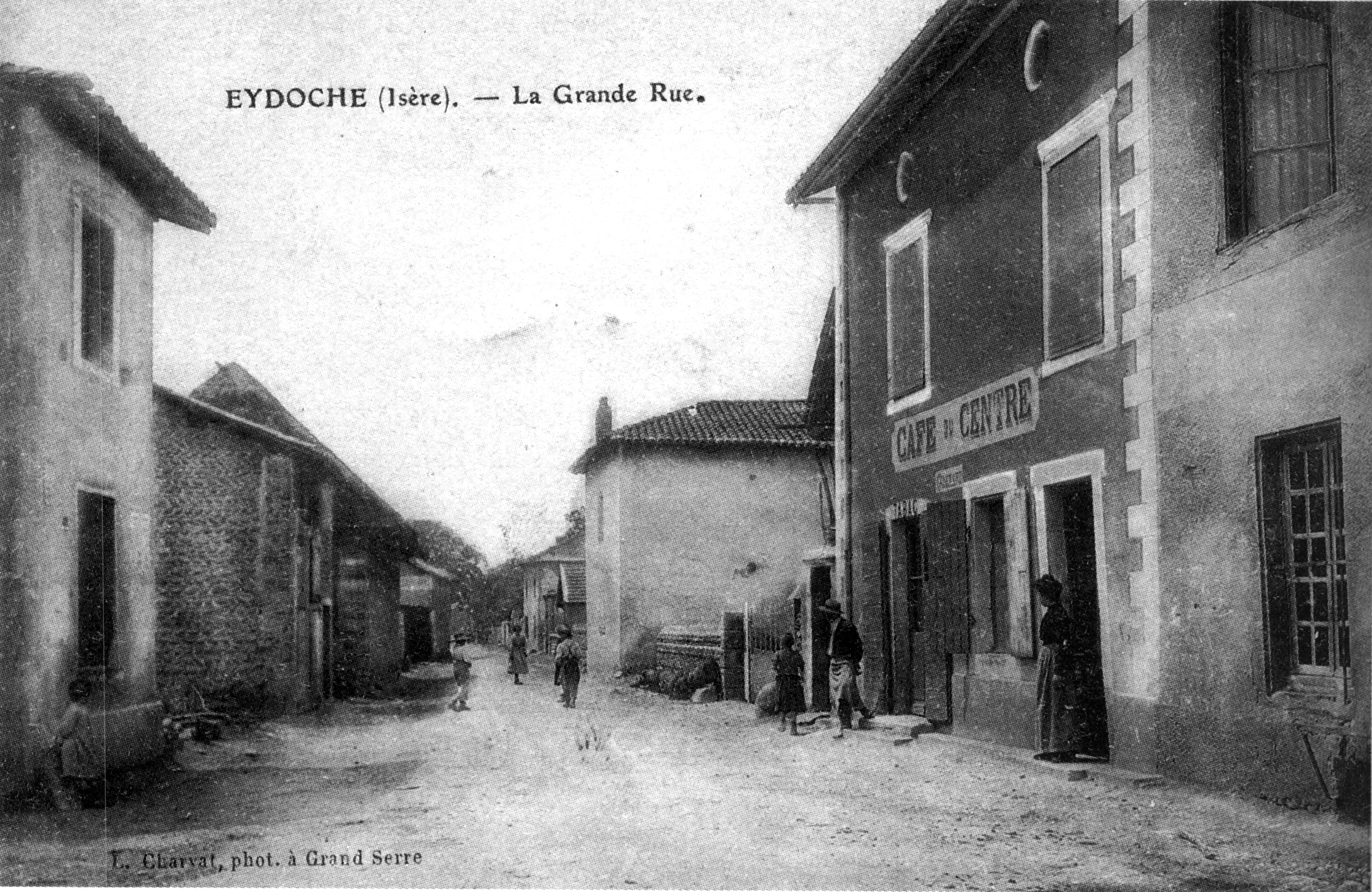 Eydoche, la Grande Rue en 1920.